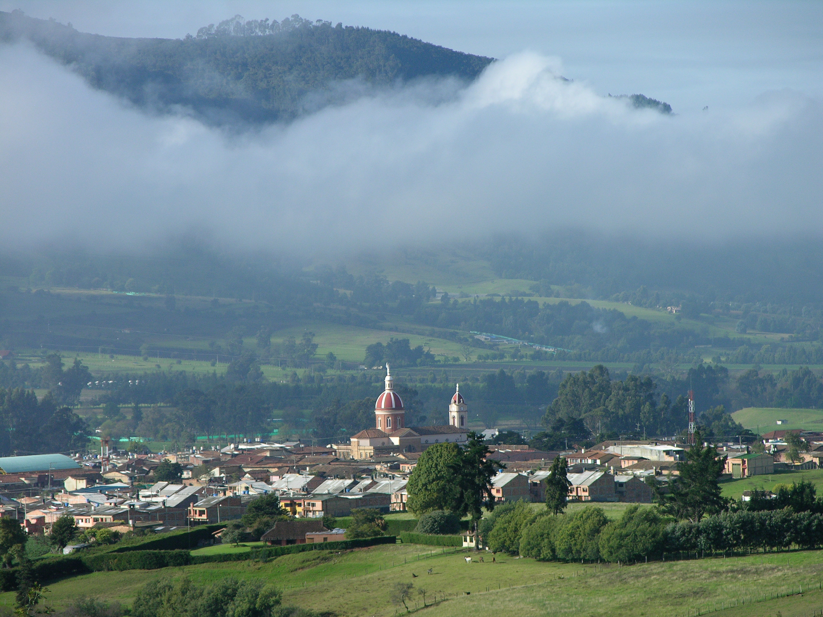 Vista de Subachoque en la madrugada